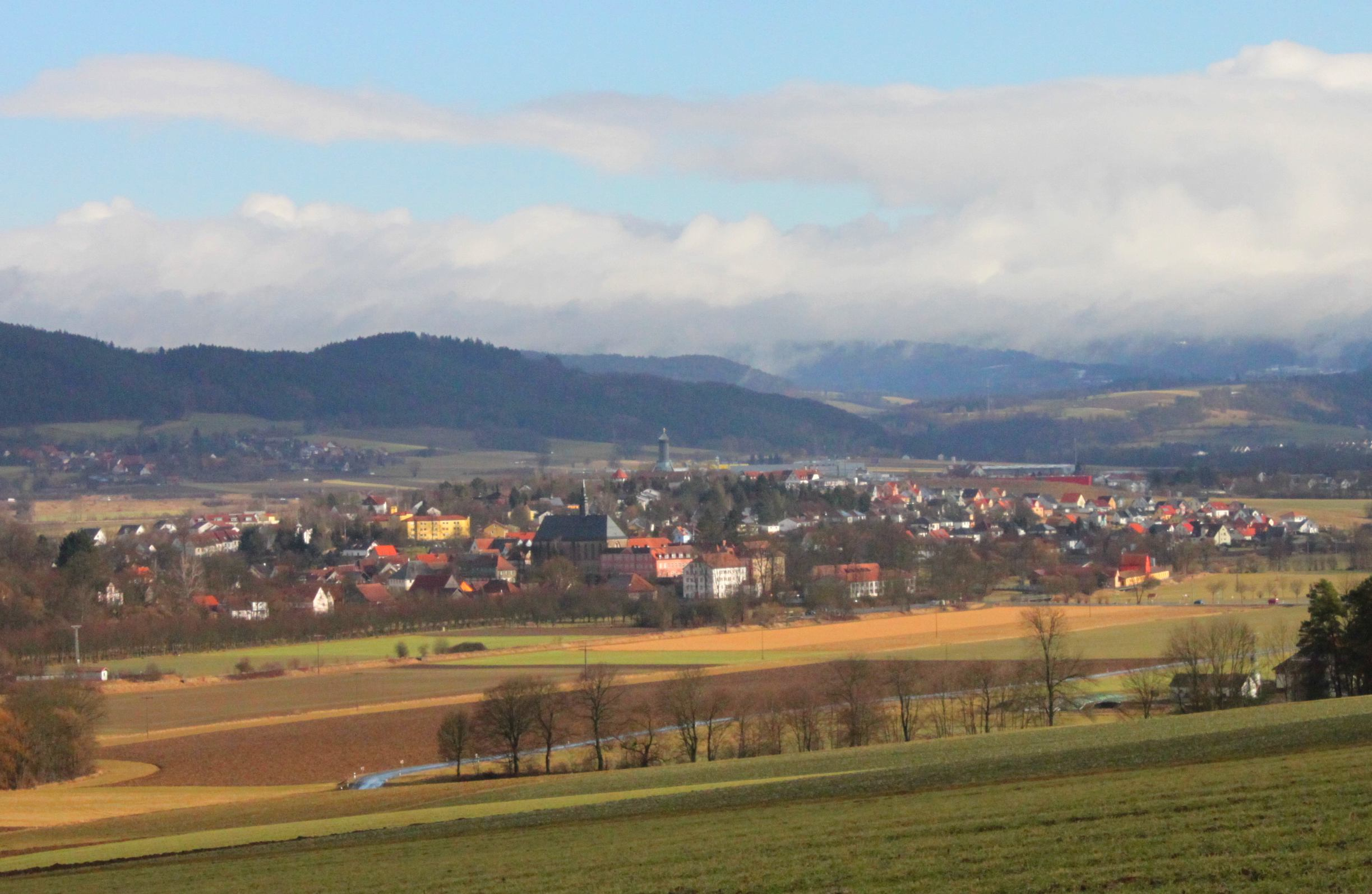 Blick von Süden auf Himmelkron